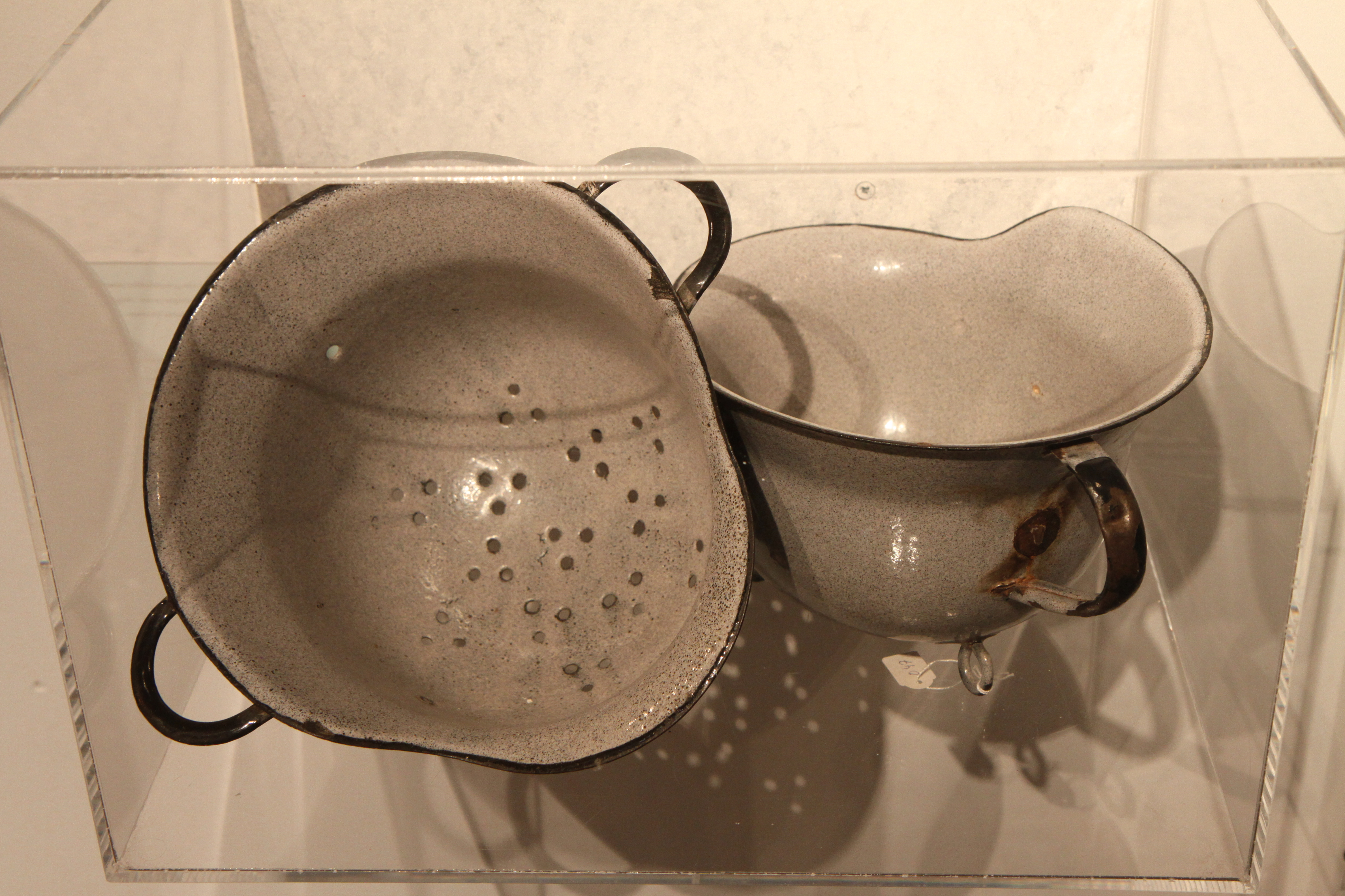 090626-122255_ 1773_50D